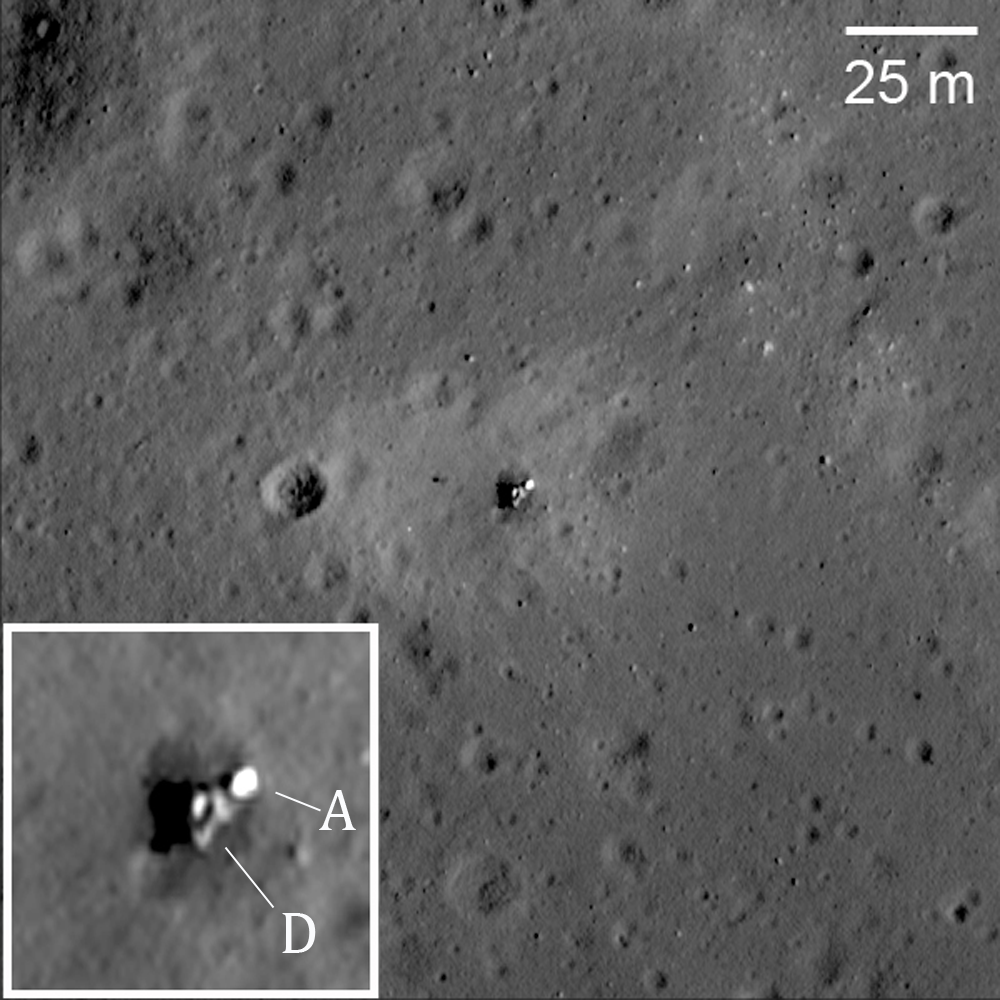 The entire Luna 23 vehicle (descent stage, ascent stage and Earth-return capsule) landed at an unexpected speed and fell on its side. Enlargement of vehicle in lower left inset; D: descent stage, A: ascent stage. NAC M174868307R [NASA/GSFC/Arizona State University].